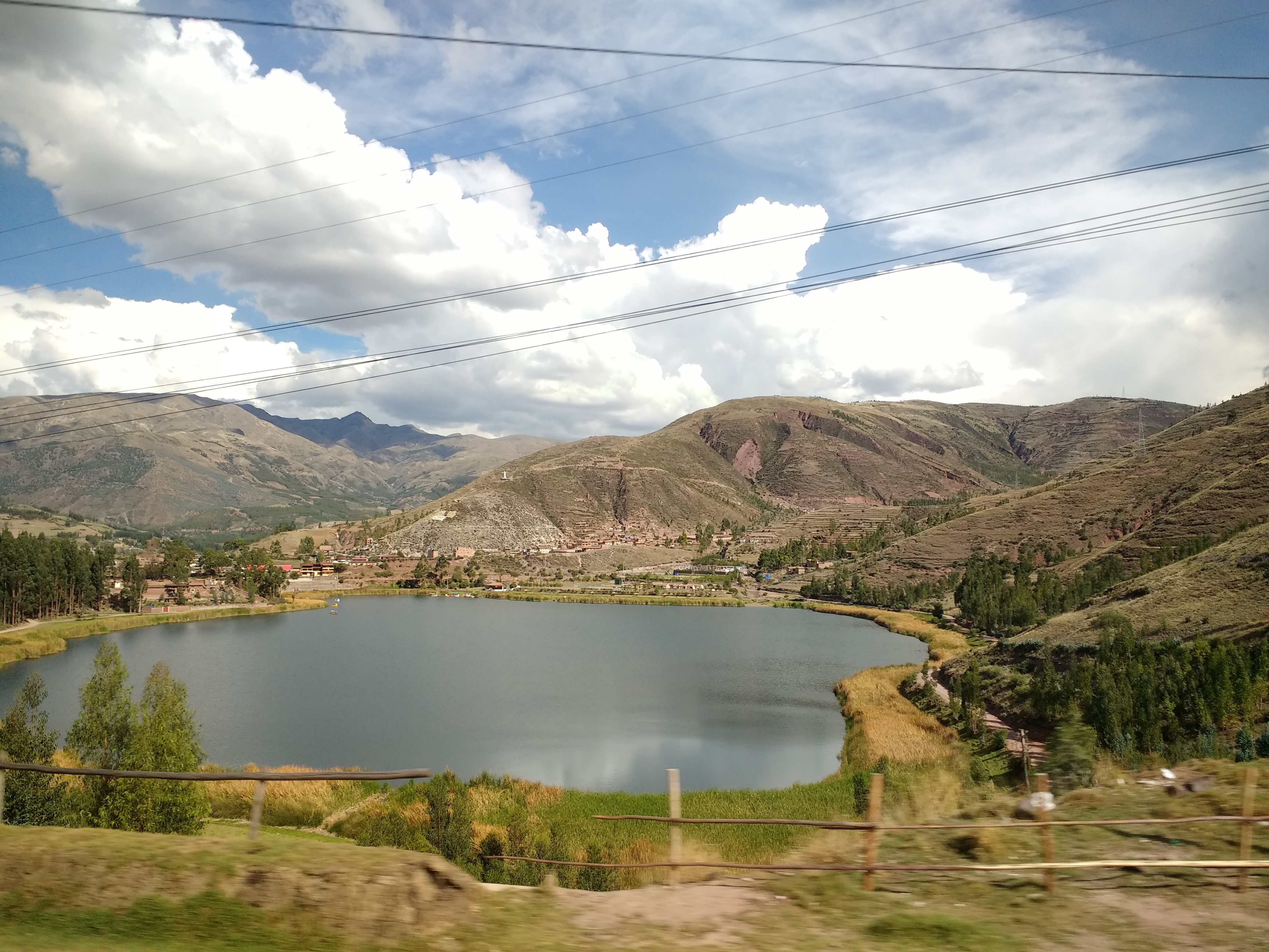 Laguna de Urcos en Perú.